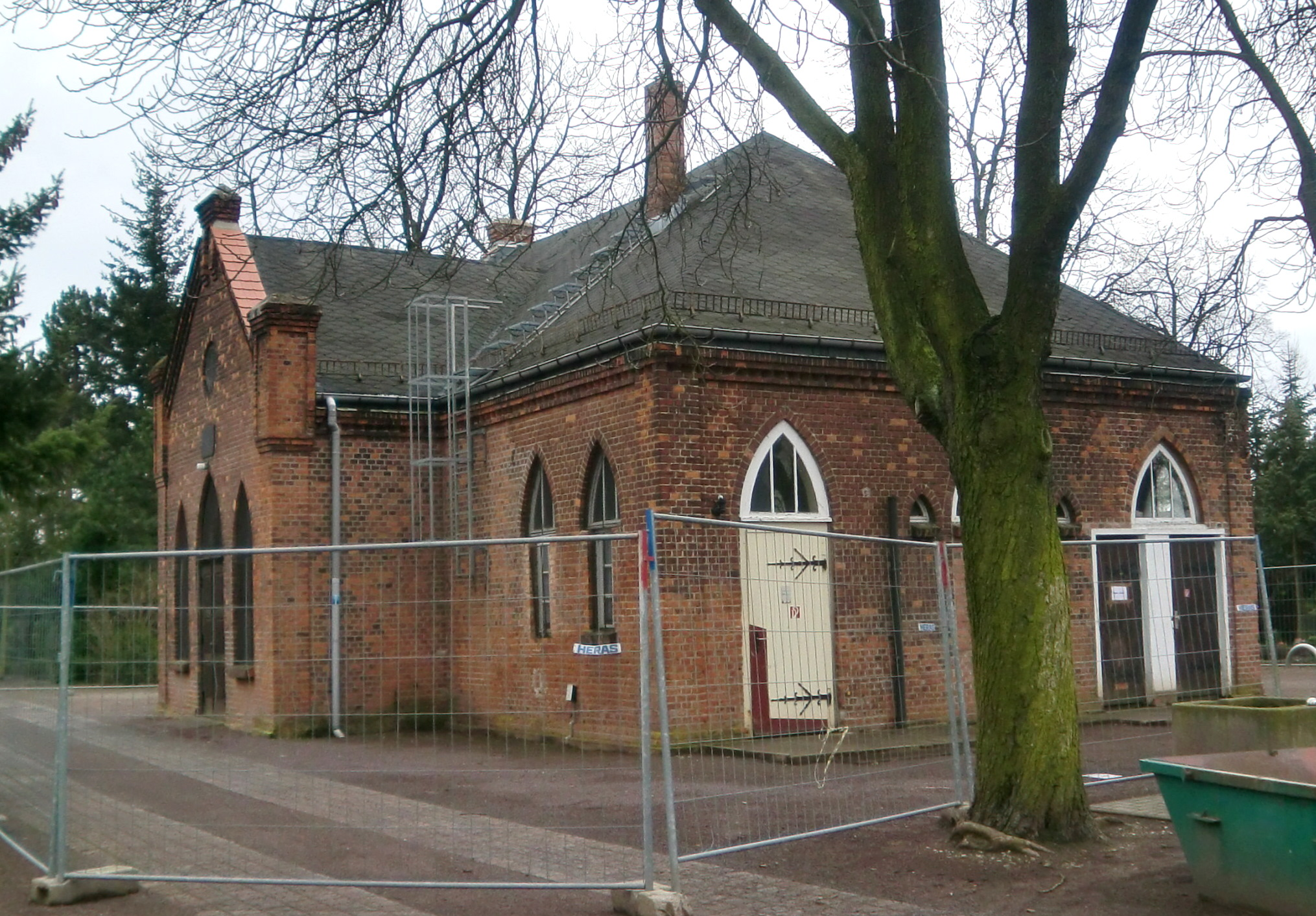 ehemalige Friedhofskapelle Salbke